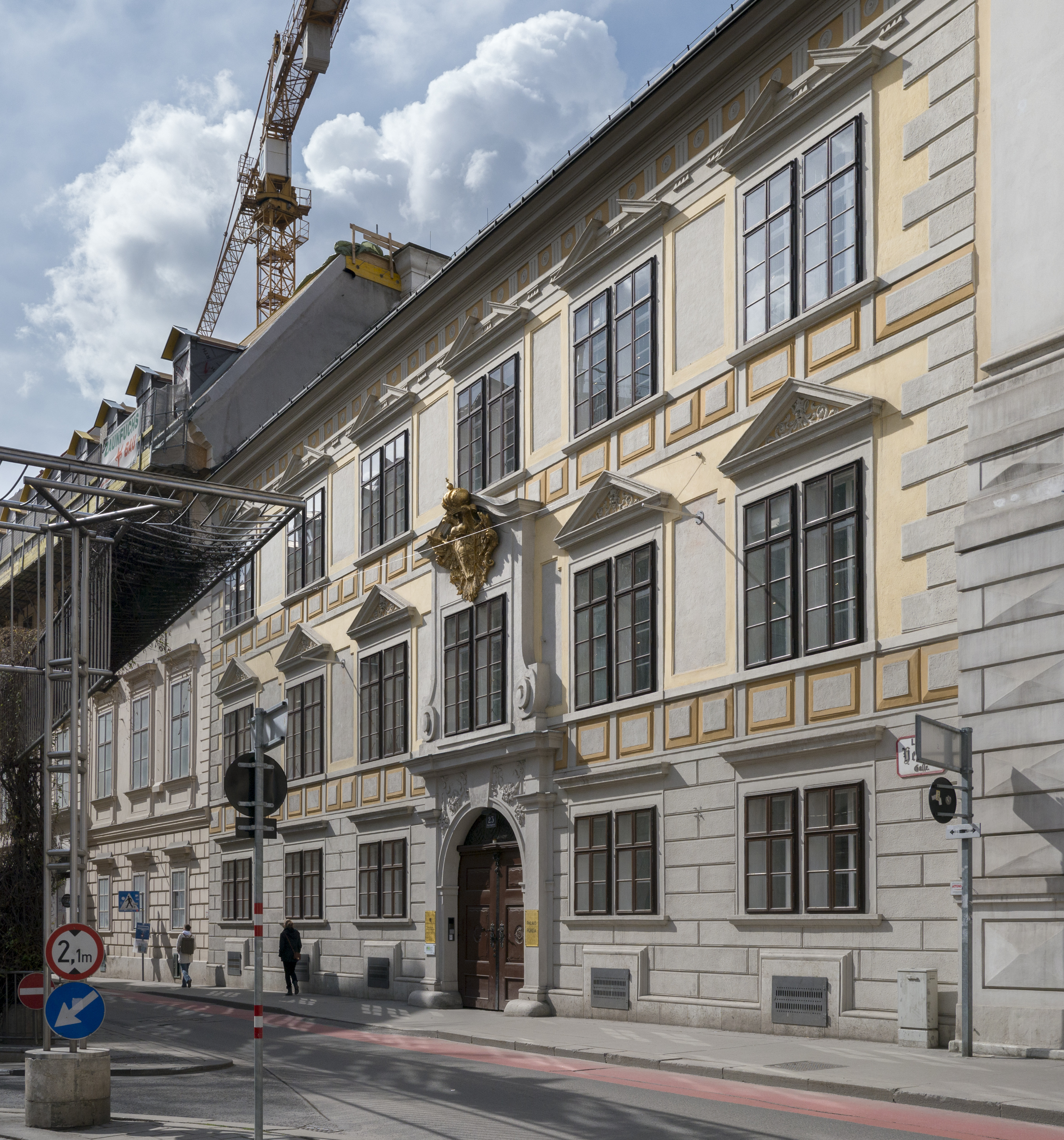 Ehem. Palais Porcia